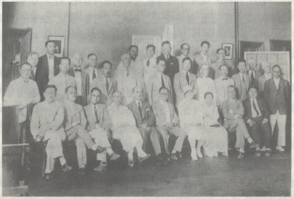 윤치호 희년 축하기념회 발기회